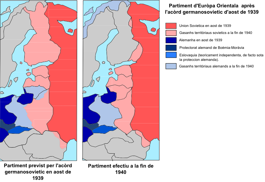 Partiment Germanosovietic d'Euròpa Orientala.